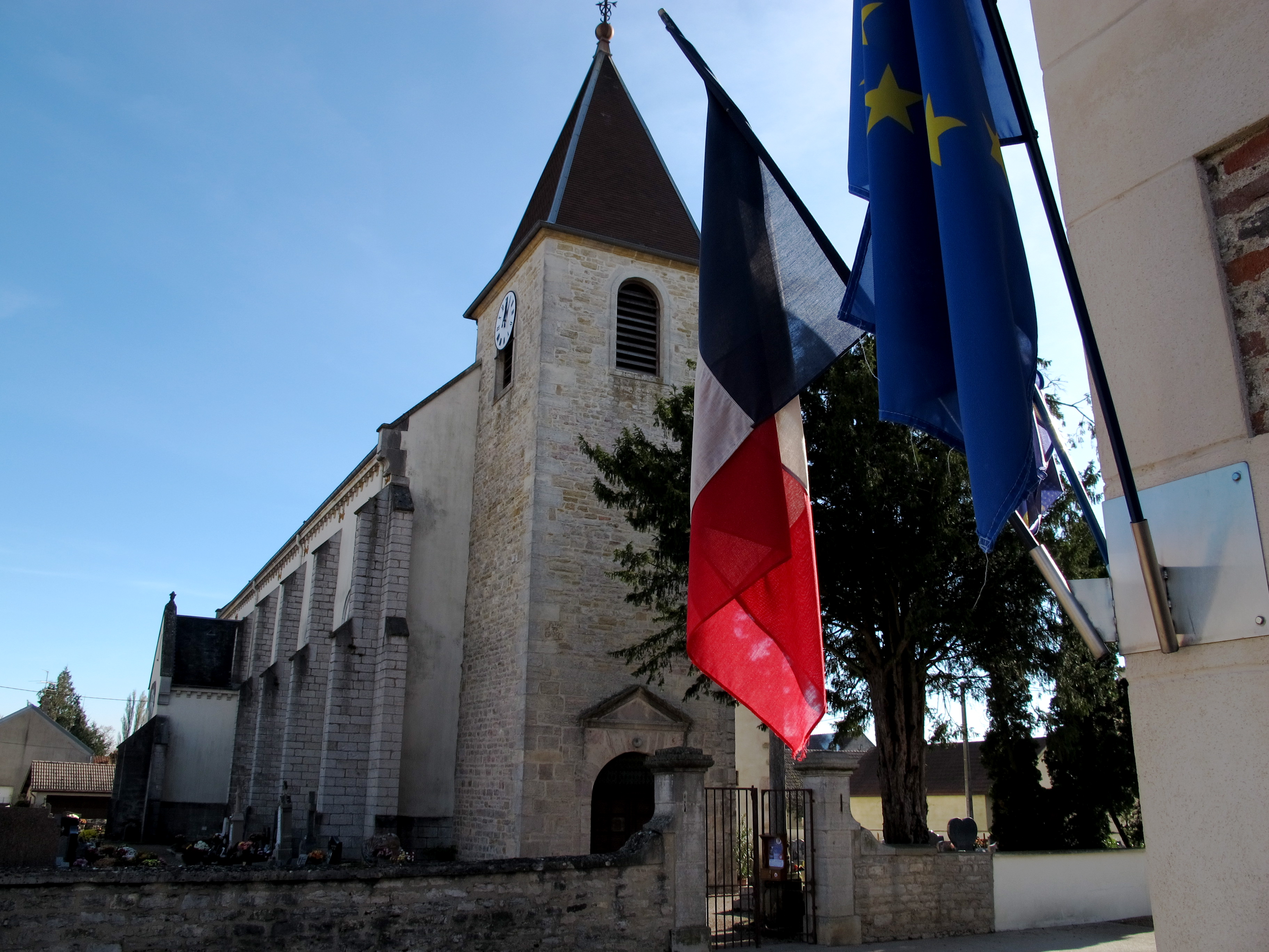 Eglise et mairie d'Annoire Jura France